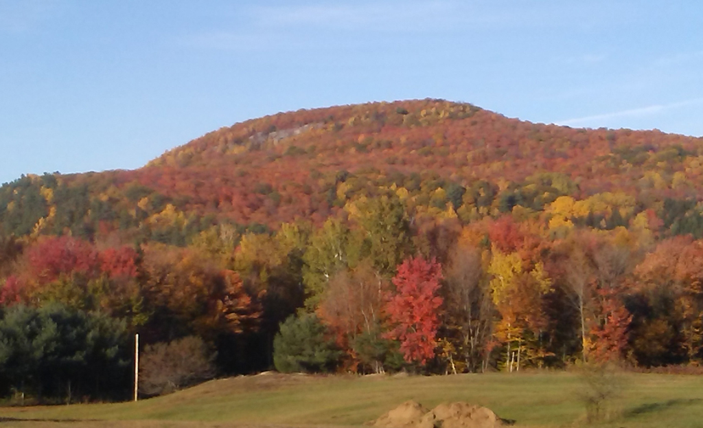 Le mont Saint-Louis vue du rang Sainte-Cécile à Sainte-Béatrix